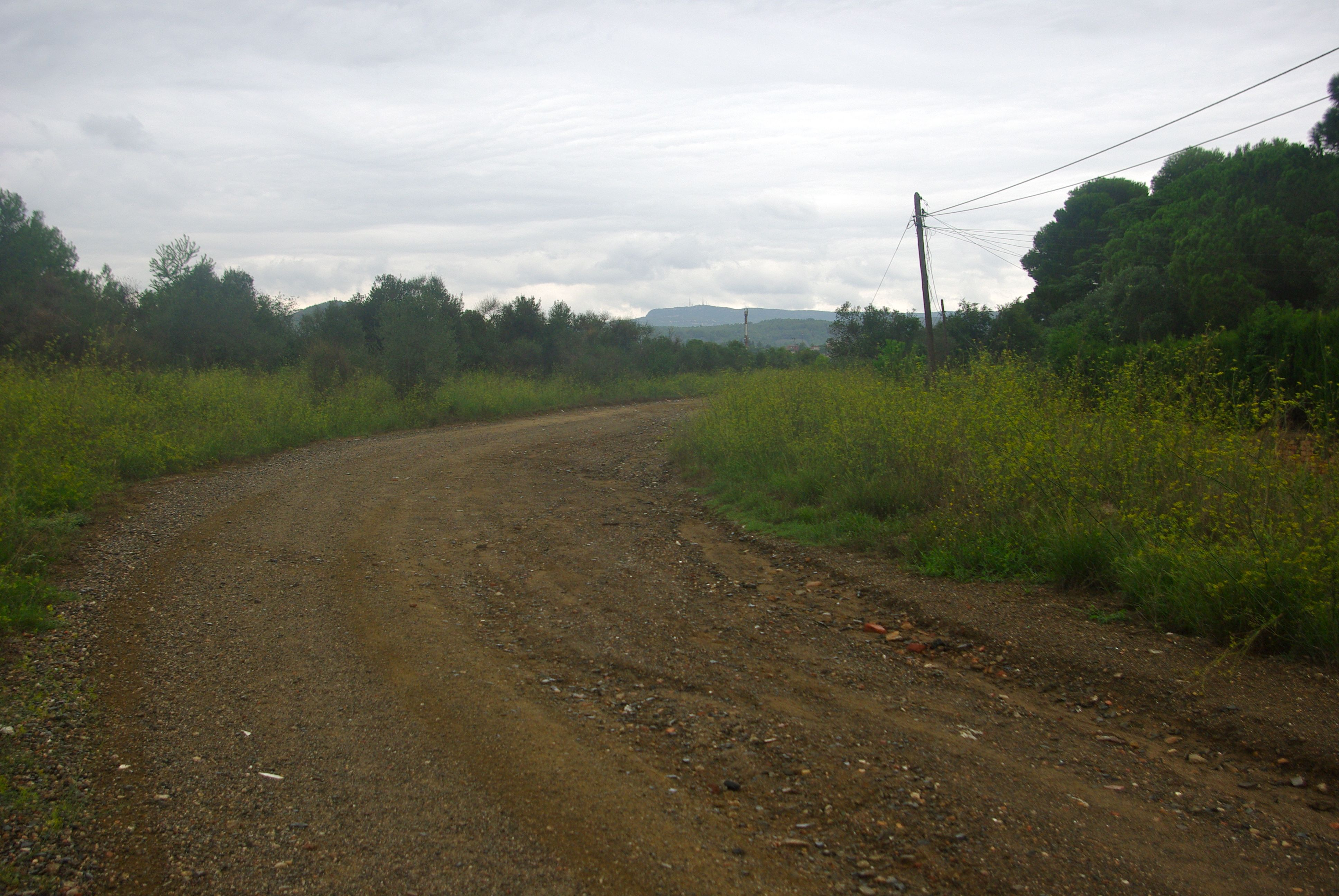 Camí de les Ànimes en el seu inici, al terme de Reus